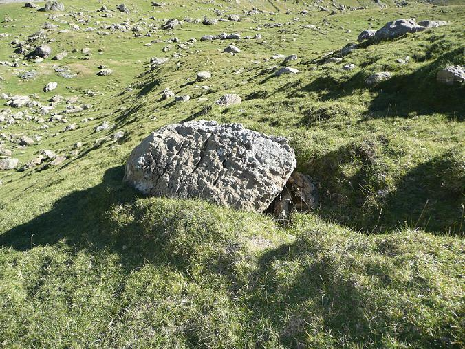 Bloc laboureur dans les Pyrénées centrales françaises